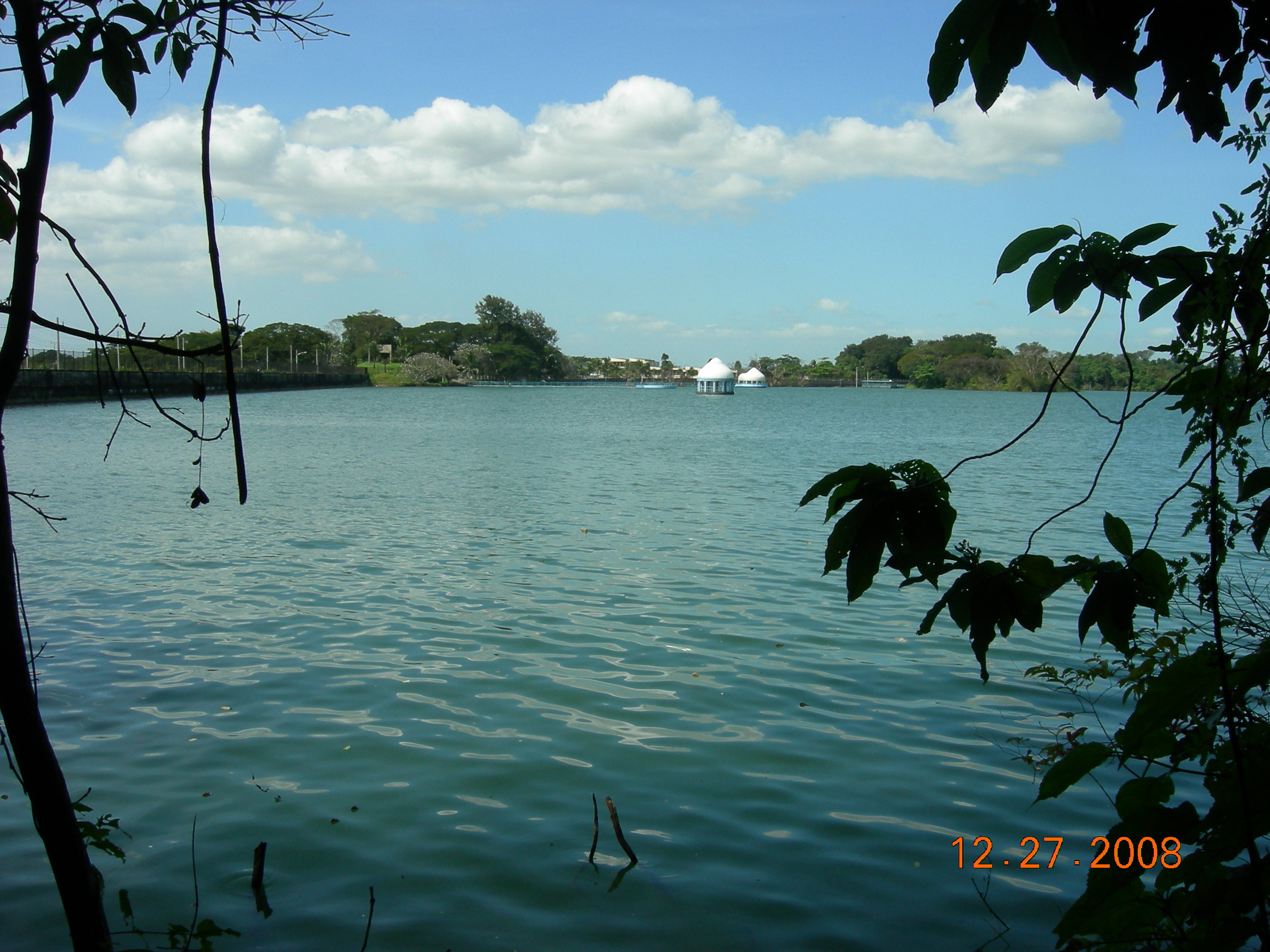 La Mesa Dam